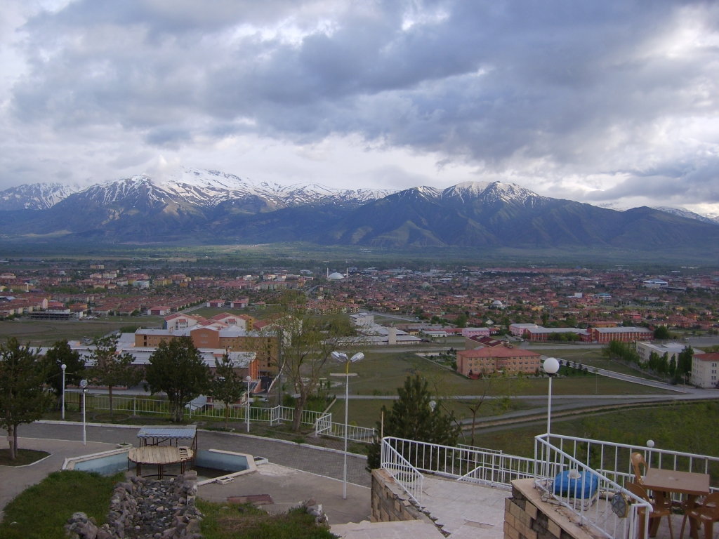 Erzincan panoraması